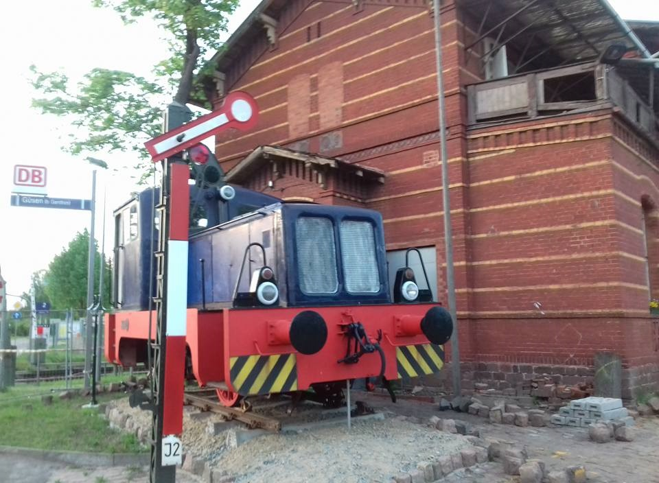 Denkmal der ehm. Genthiner Kleinbahn am Bahnhof Güsen